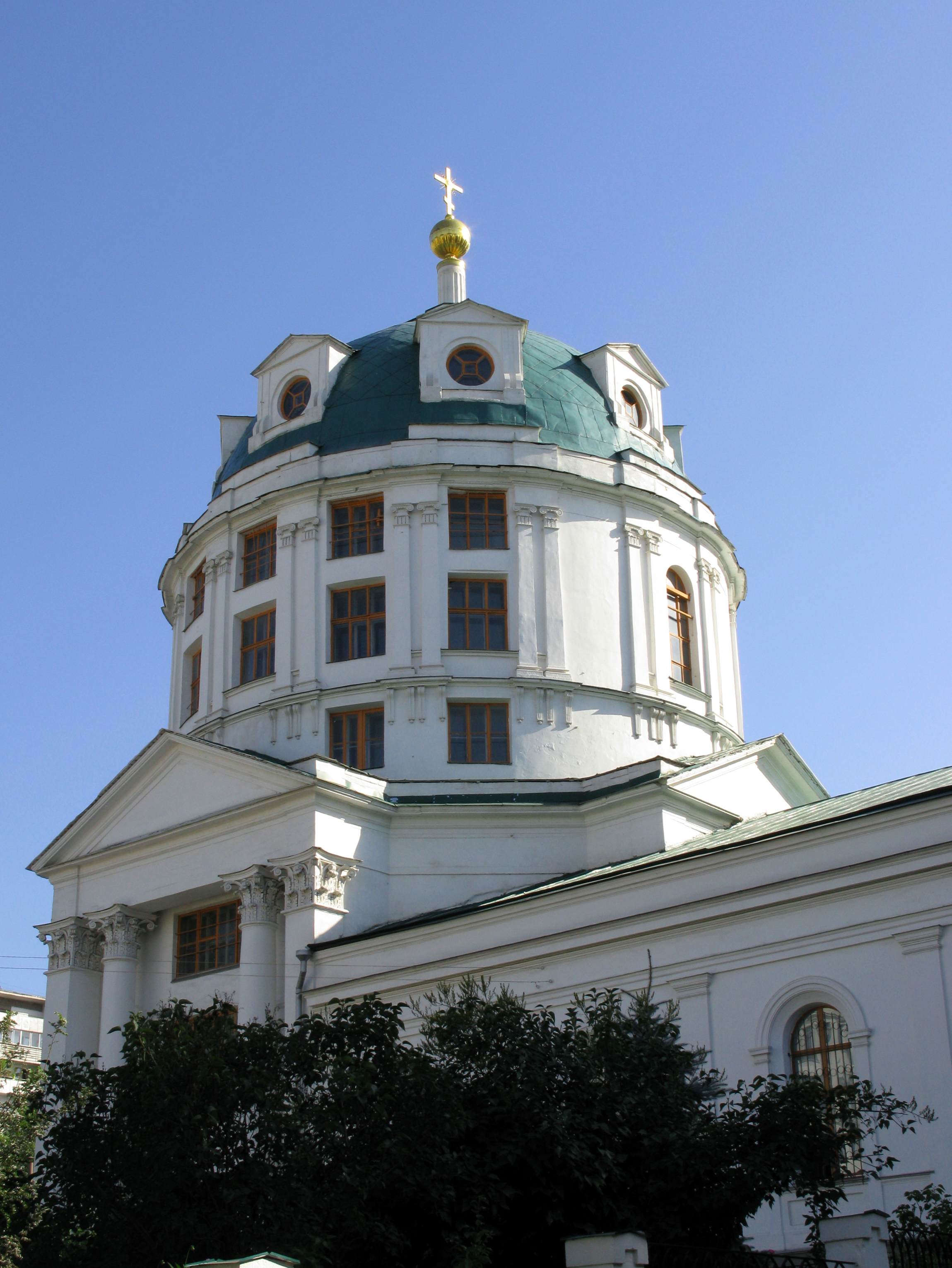 Храм Преподобного Симеона Столпника за Яузой